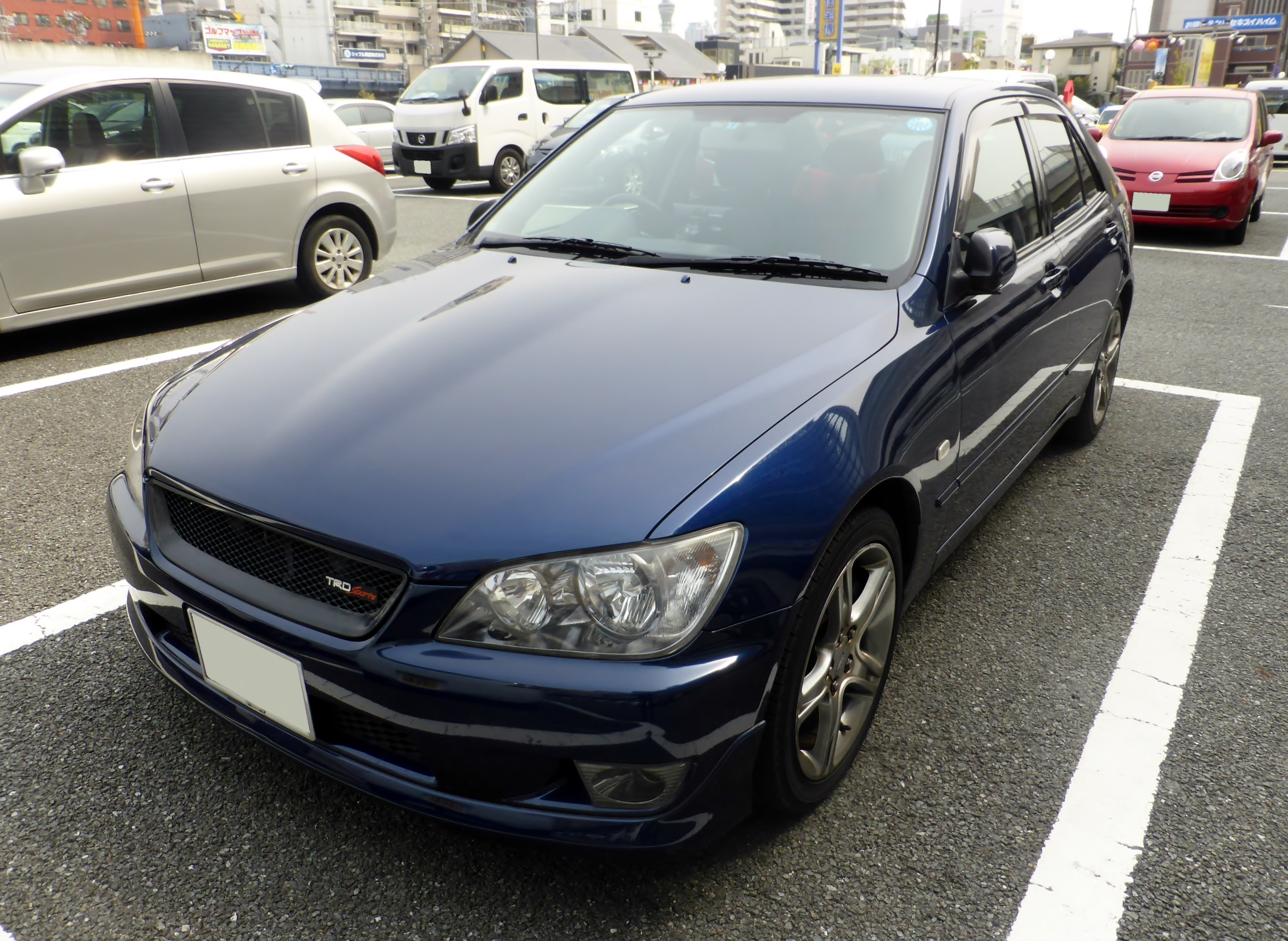 GXE10型トヨタ・アルテッツァAS200をフロントから撮影。